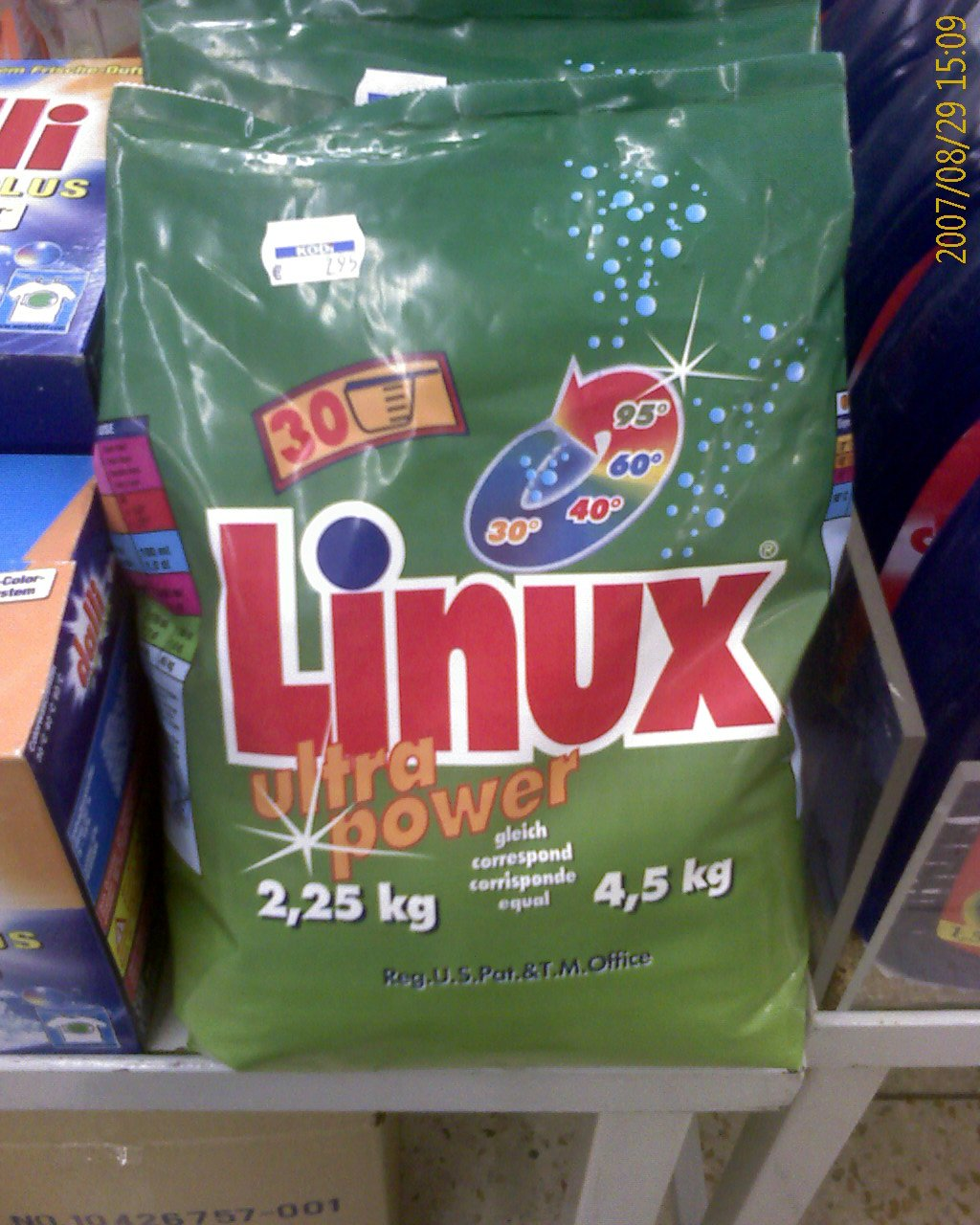 Linux-Vollwaschmittel-Ultra-Power-Packung